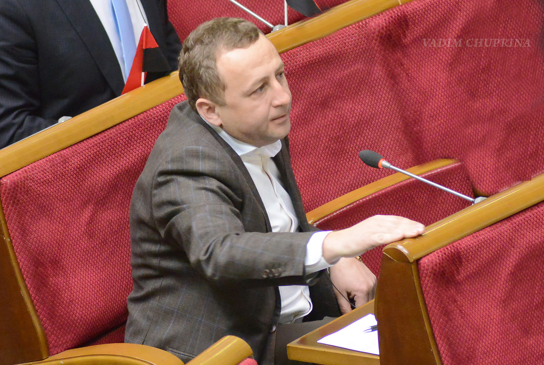 ВЕРХОВНАЯ РАДА УКРАИНЫ 2015 , фото Вадим Чуприна